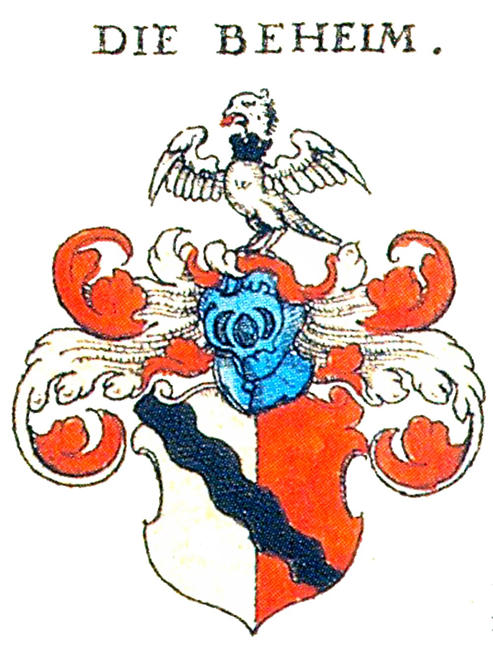 Wappen der Nürnberger Patrizierfamilie Behaim von Schwarzbach auf Kirchensittenbach